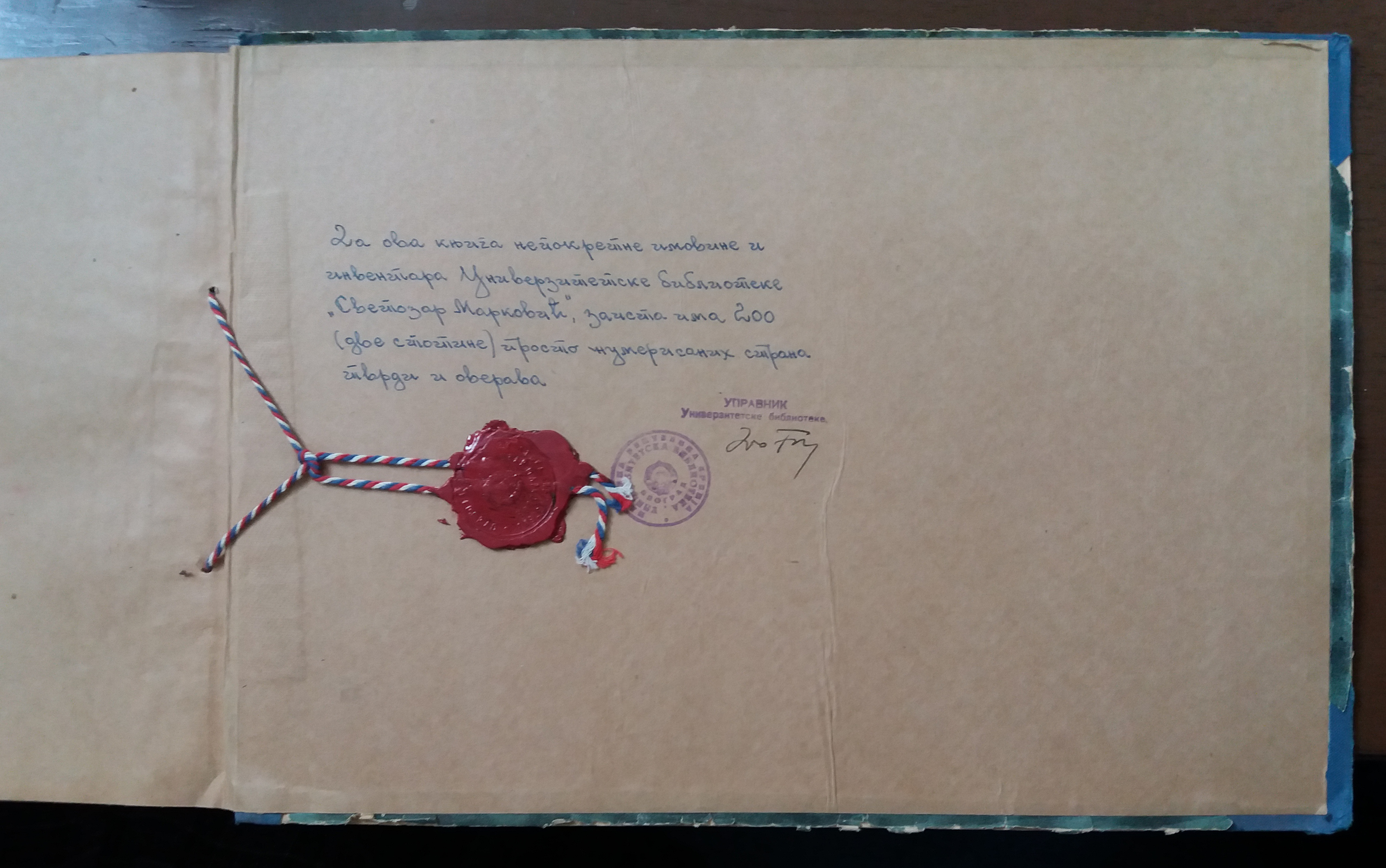 Књига основних средстава - овера броја страна.